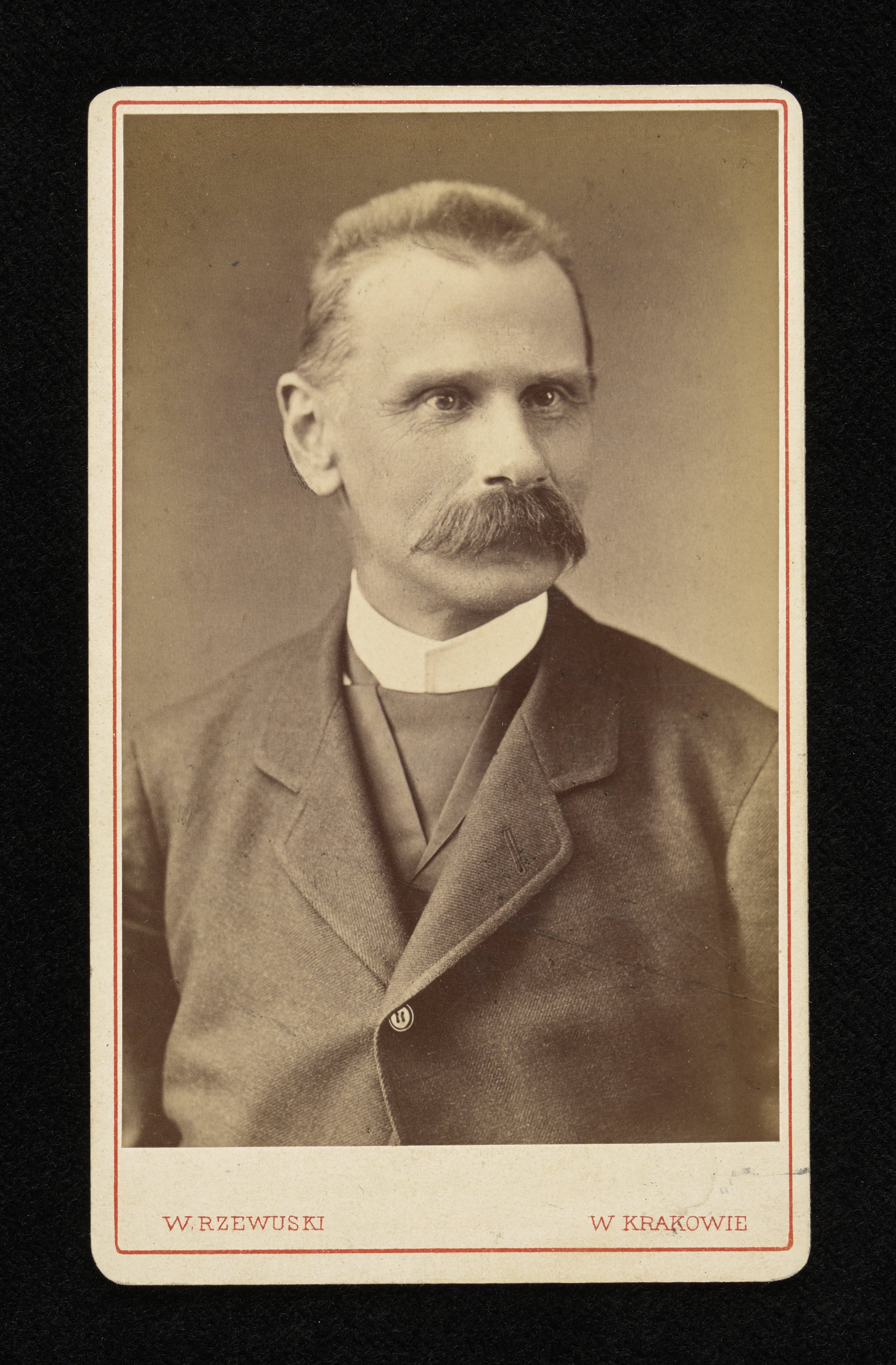 Izydor Dzieduszycki - fotografia z Zakładu Walerego Rzewuskiego, ok. 1879 r.